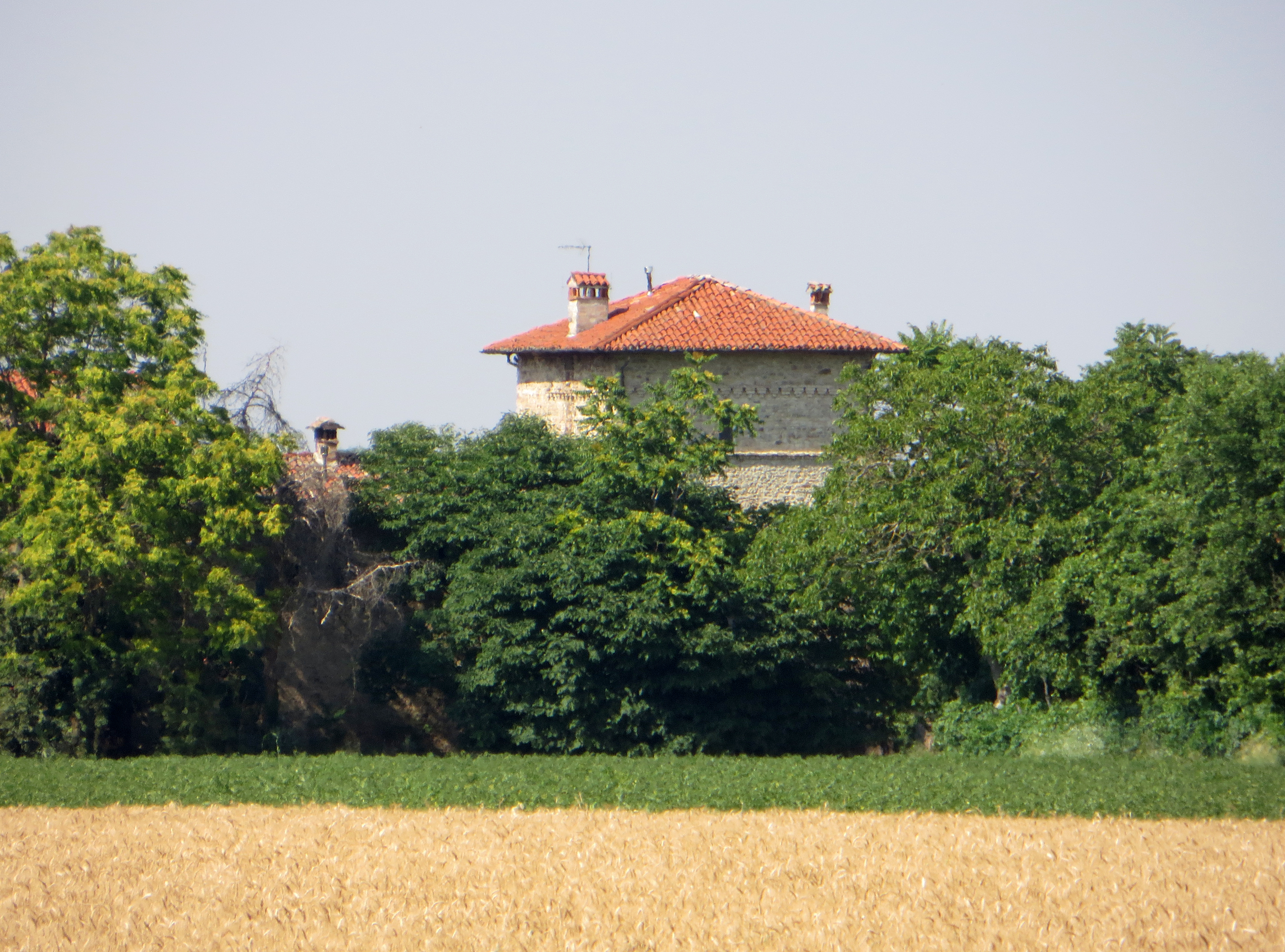 Torre degli Alberi (Alberi, Parma) - lato sud